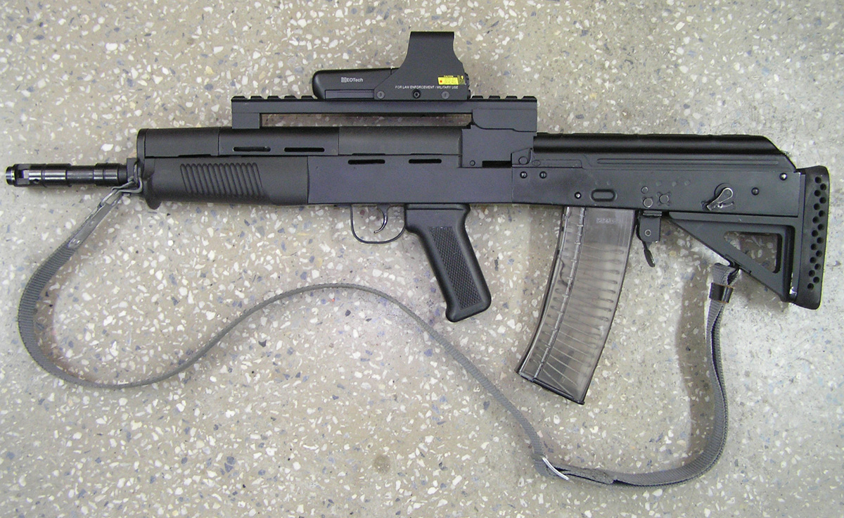 kbk wz. 2005 Jantar-M